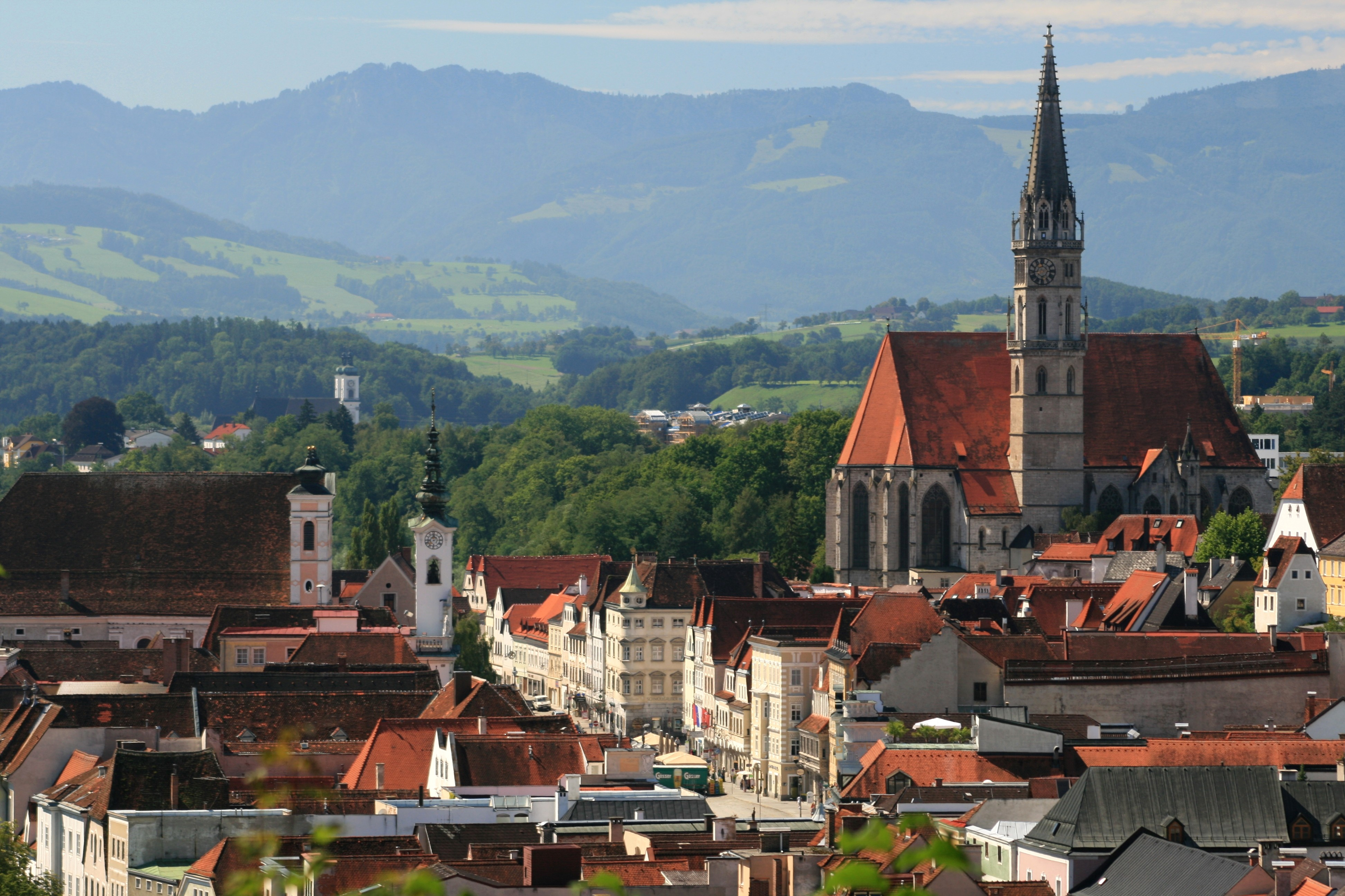 Blick über die Steyrer Altstadt. Links am Stadtplatz liegen das Rathaus (mit Turm) und dahinter die Marienkirche. Das dominante Gebäude in der rechten Bildhälfte ist die Stadtpfarrkirche Steyr. Im Hintergrund links die ehemalige Stiftskirche Garsten. Das Gebäude mit dem auffallend vorspringenden Erker rechts schräg vor dem grünen Lastwagen ist das gotische Bummerlhaus, eines der ältesten Gebäude der Stadt und das Steyrer Wahrzeichen. Aufgenommen wurde das Foto vom Taborturm aus.